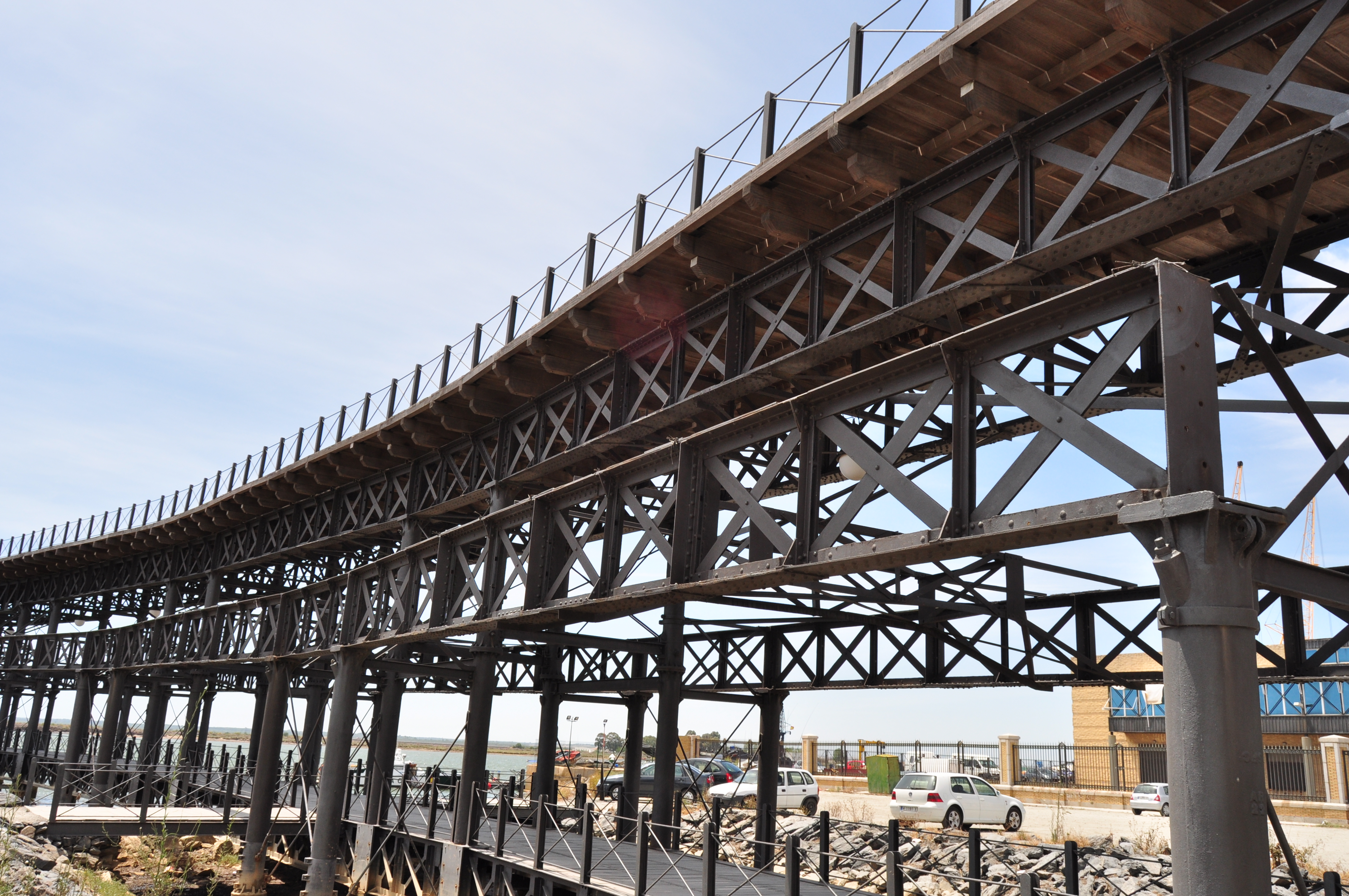 Huelva Capital - 003